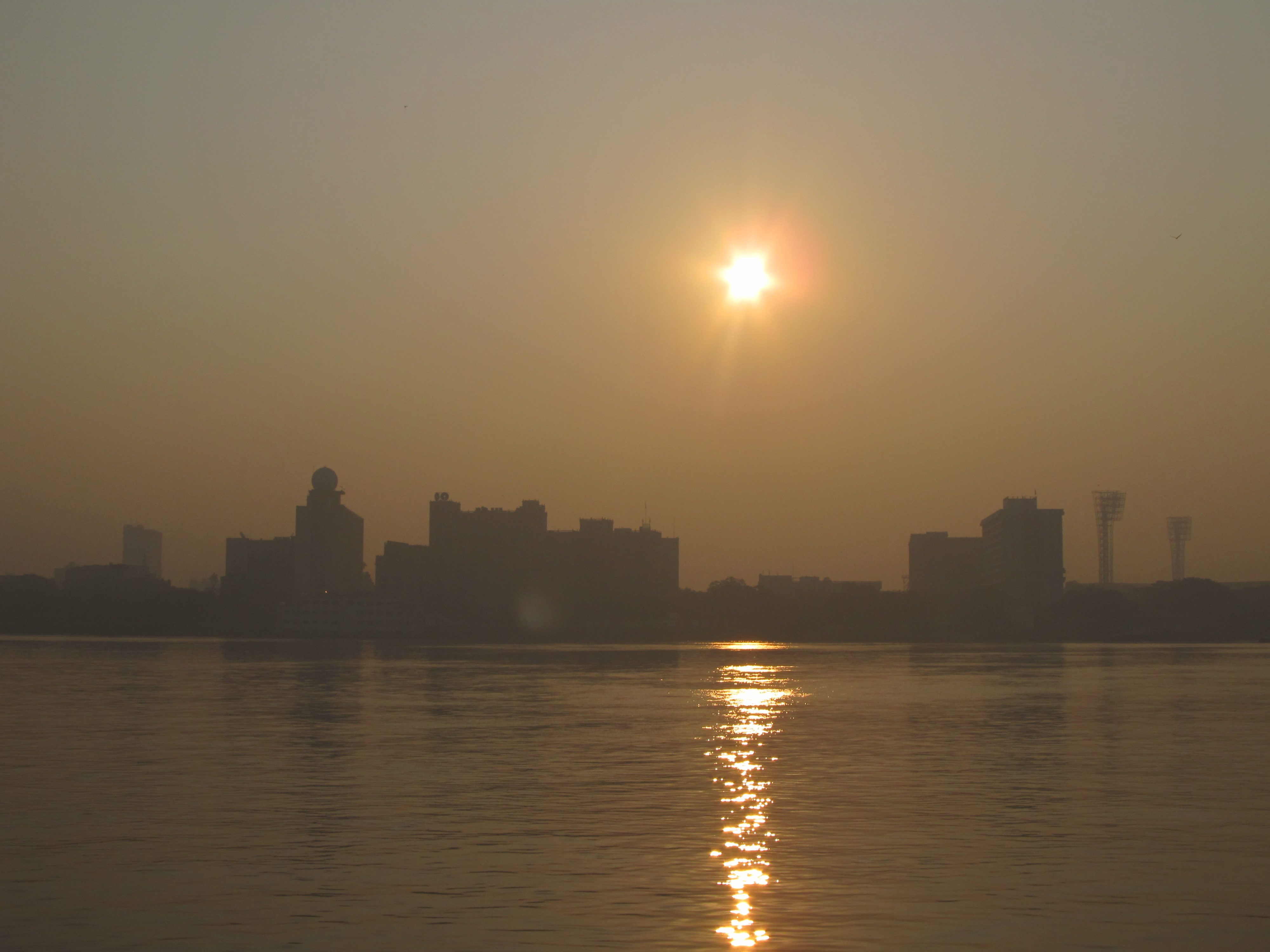 Photographed at Kolkata.